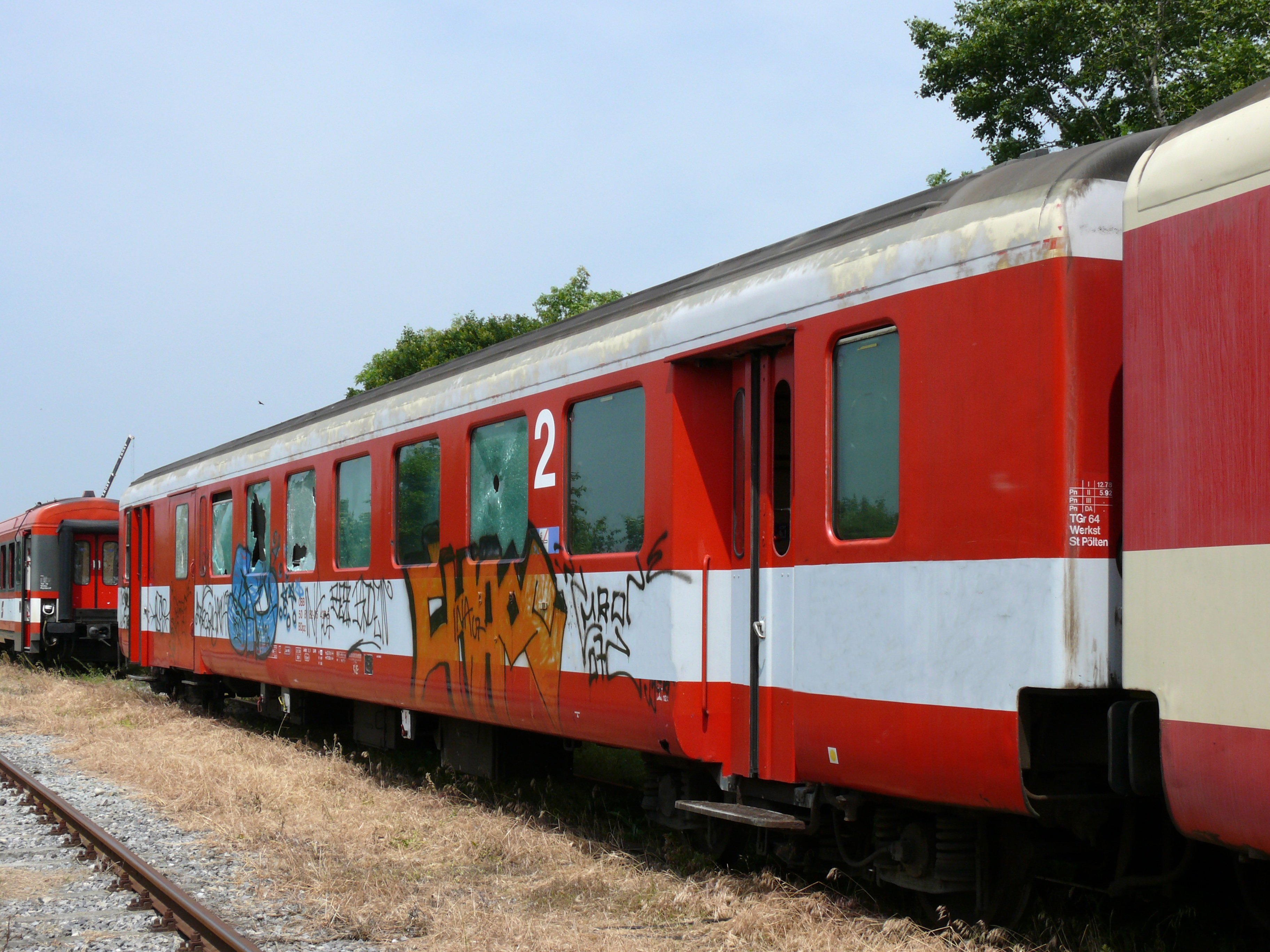 Schlierenwagen BDpz 82-35 437-5 in abweichender Lackierung am Vbf. Breitenlee.